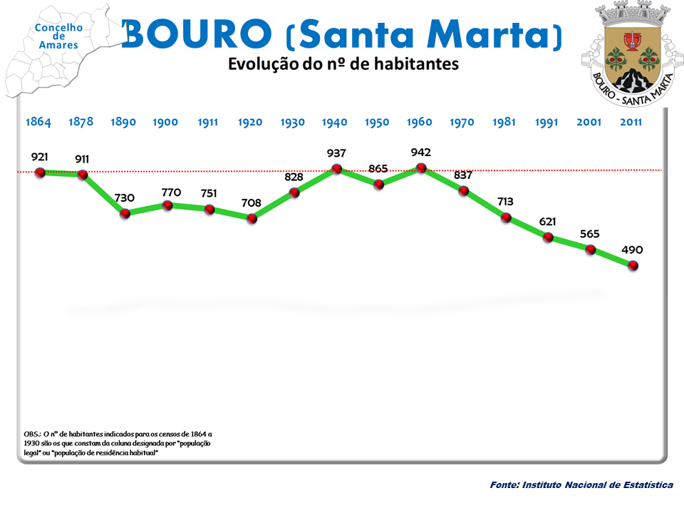 Censo 2011